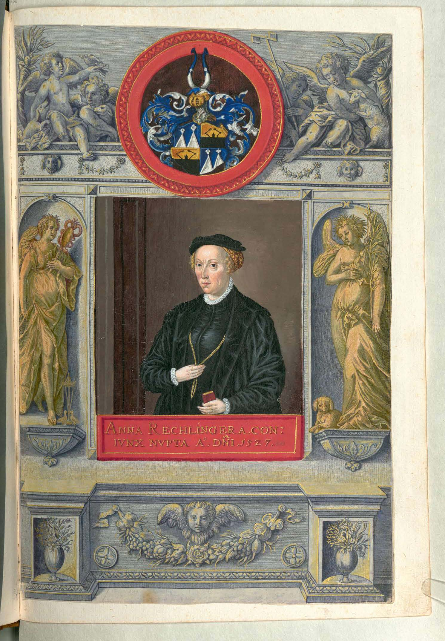 Fuggerorum et Fuggerarum imagines wurde 1588 von Philipp Eduard Fugger beim Kupferstecher Dominicus Custos in Auftrag gegeben. Das Werk enthält mit Aquarell- und Gouache-Farbe kolorierte Stiche der Mitglieder der Fugger von der Lilie. Der Druck von 1618 stellt das einzige kolorierte Exemplar dar. Anna Rehlinger (1511-1548), Ehefrau Anton Fuggers (1493-1560, ohne Abbildung)